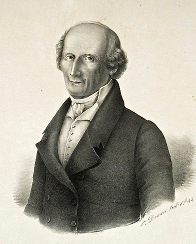 Pierre-Louis Guinand (1748–1824), Lithografie von Étienne-Ovide Domon (1807–1873) nach einem von Gemeindepräsident C.-A. Jeanneret in Les Brenets (Kanton Neuenburg) zur Verfügung gestellten Aquarell (von Guinands Schwiegersohnn Georges-Louis-Christophe Couleru?), Neuenburg 1844. Der Schweizer Glasschmelzer und Optiker Guinand richtete im Auftrag des Unternehmers Joseph Utzschneider (1763–1840) im säkularisierten Kloster Benediktbeuern 1805/06 die weltweit erste Hütte zur Herstellung von optischem Glas ein. Dies ermöglichte Joseph Fraunhofer (1787–1826) die Entwicklung seines Genies als Wissenschaftler.